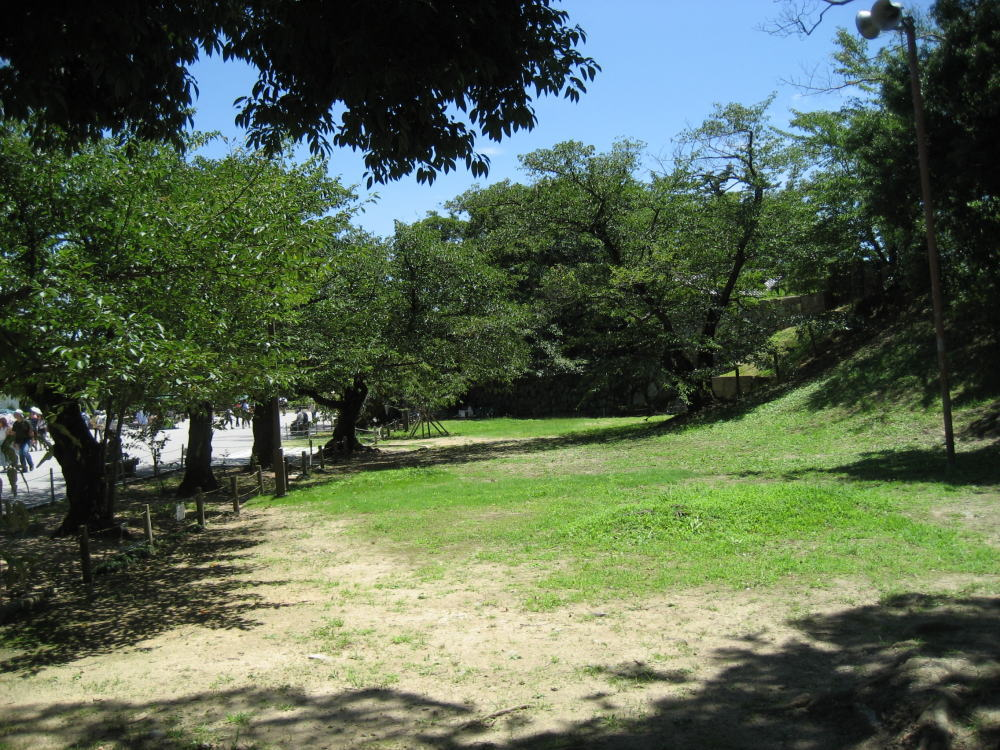 姫路城三の丸武蔵野御殿跡。